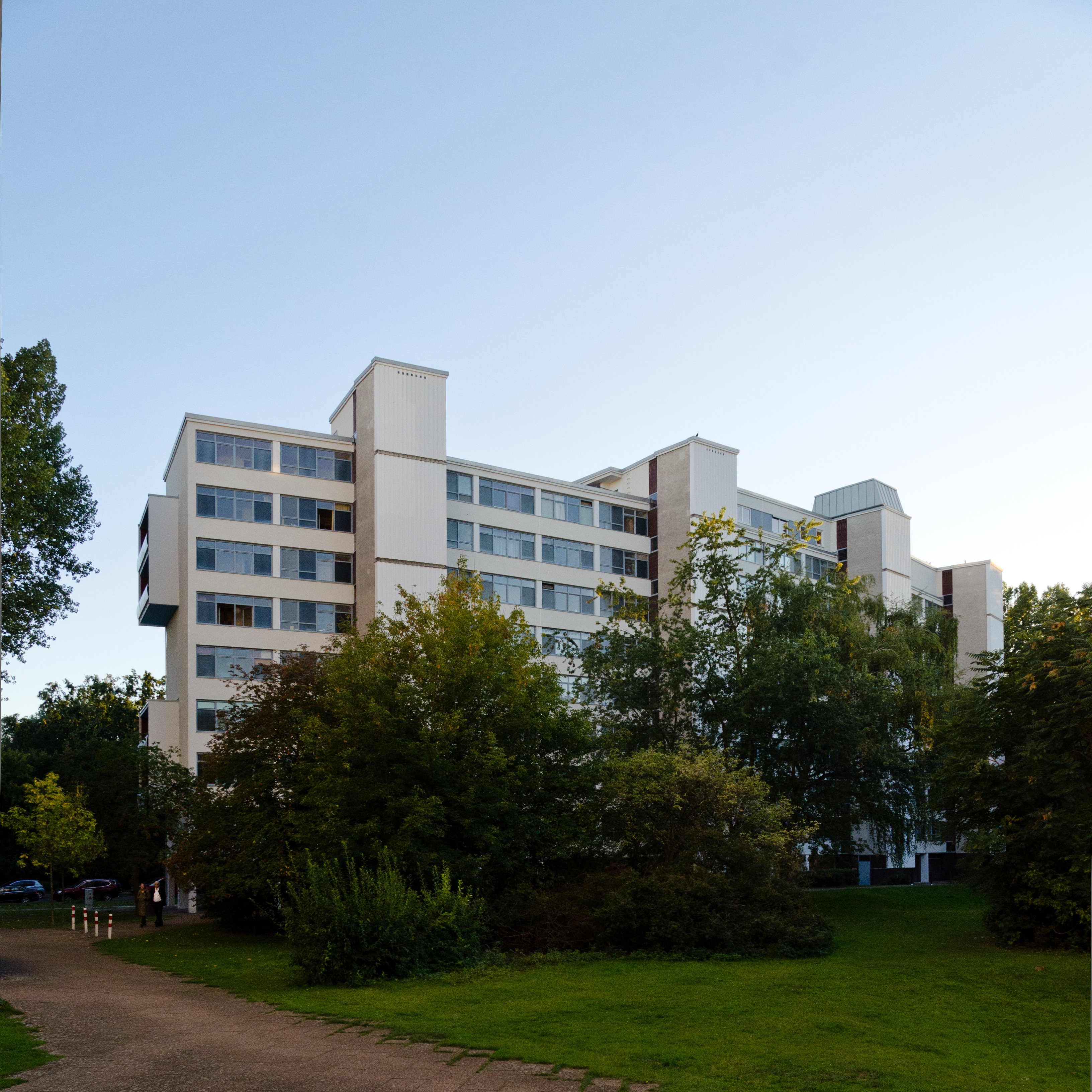 Händelallee 3/9, Wohnhaus, 1956–1957 von Walter Gropius, Seite zum Garten